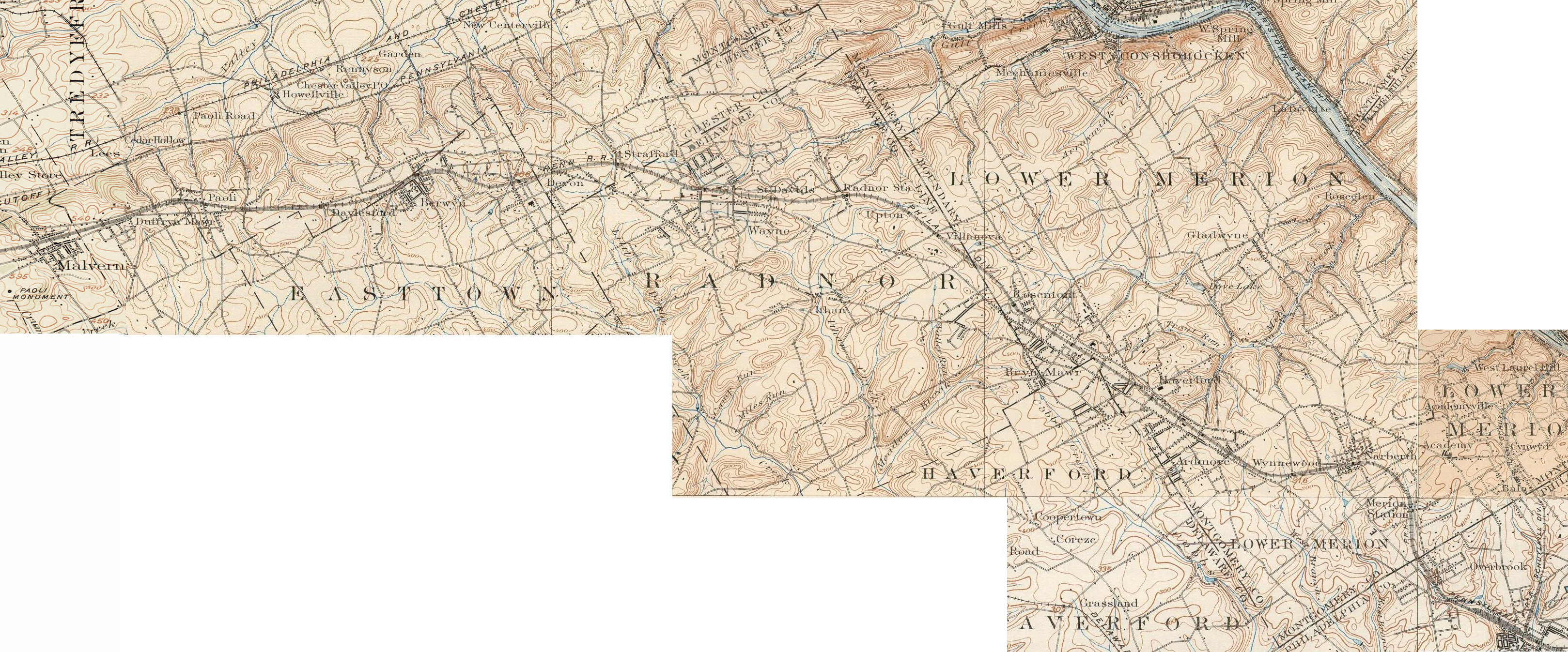 Pennsylvania Main Line in 1895